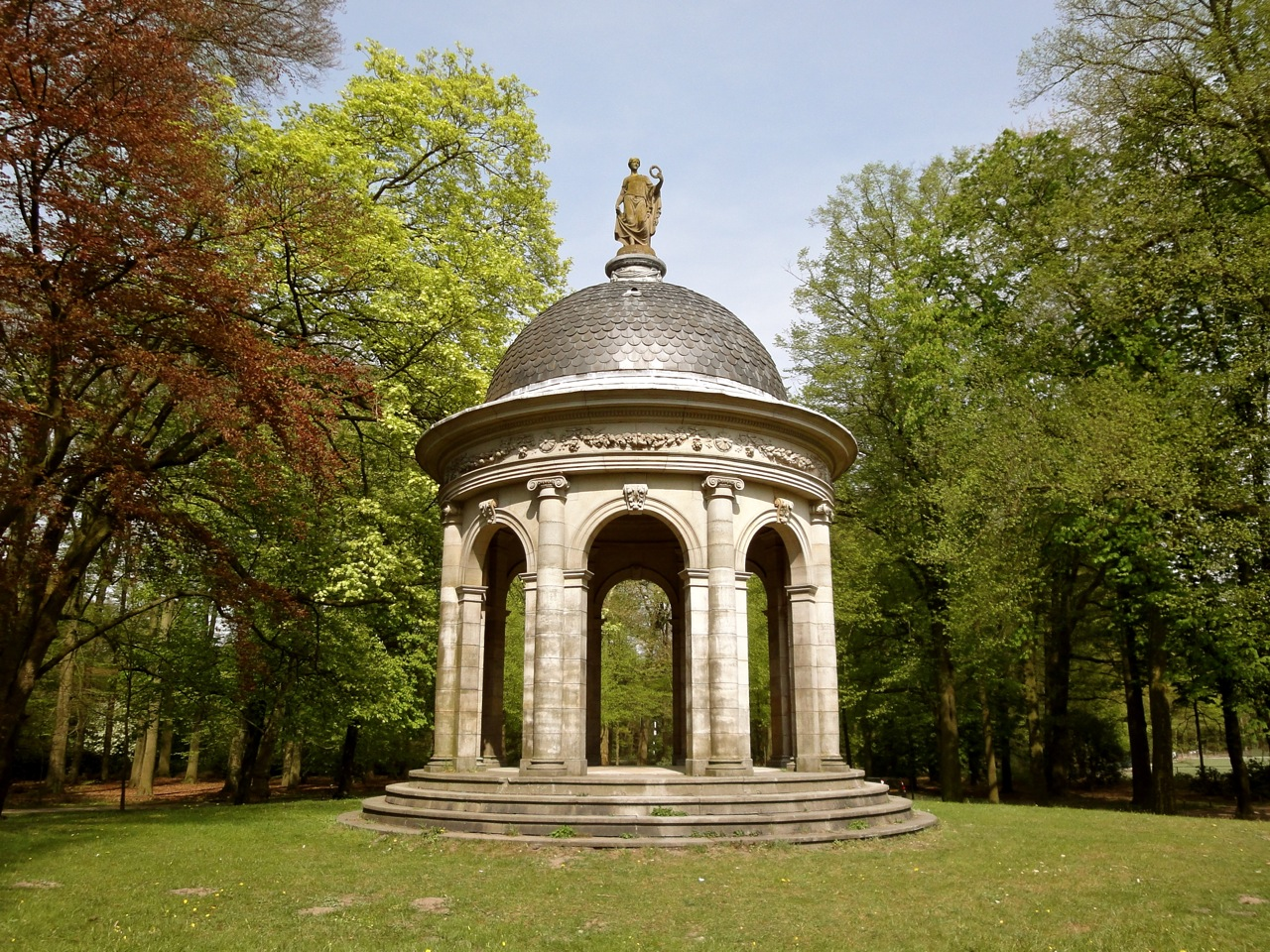 Koepel (1899) aan de Hoofdstraat in park Beerschoten-Willinkshof in Driebergen-Rijsenburg.